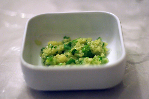 Siu mei Mashed ginger